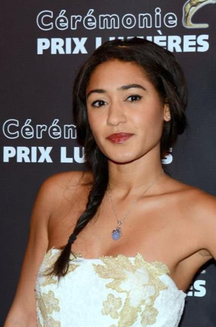 Joséphine Jobert à la cérémonie des prix Lumières 2014